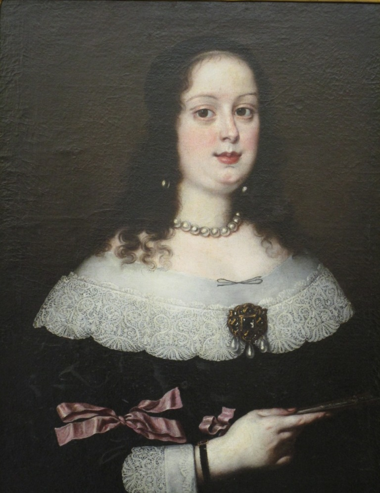 maria vittoria della rovere